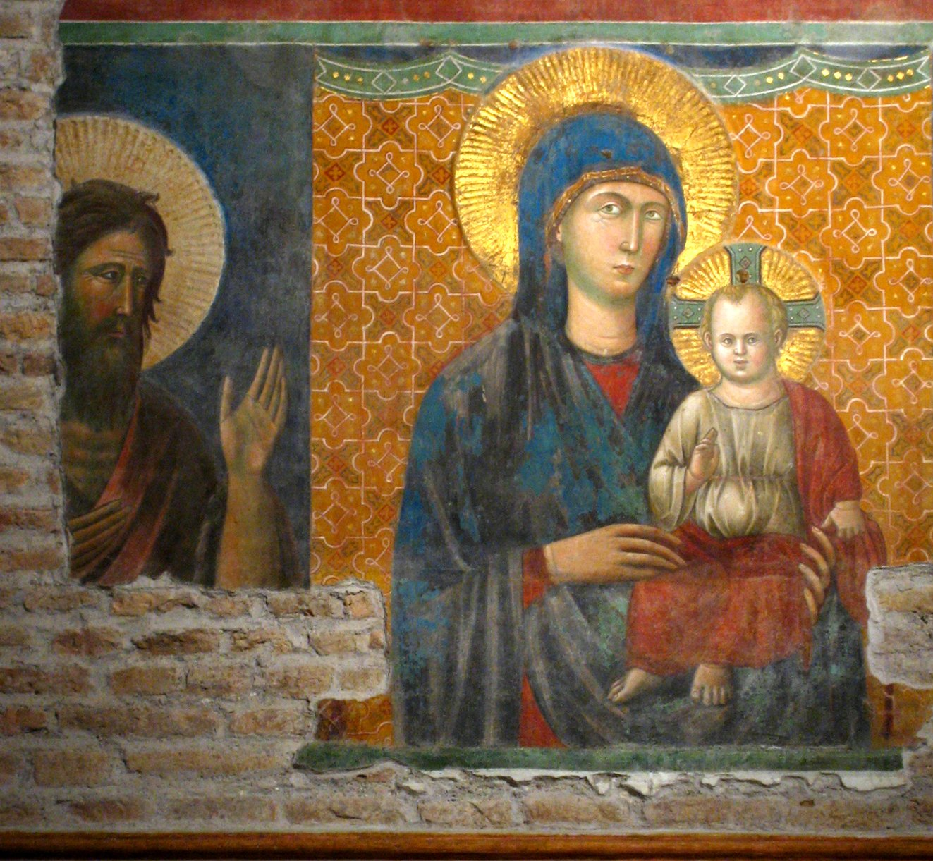 Fragment